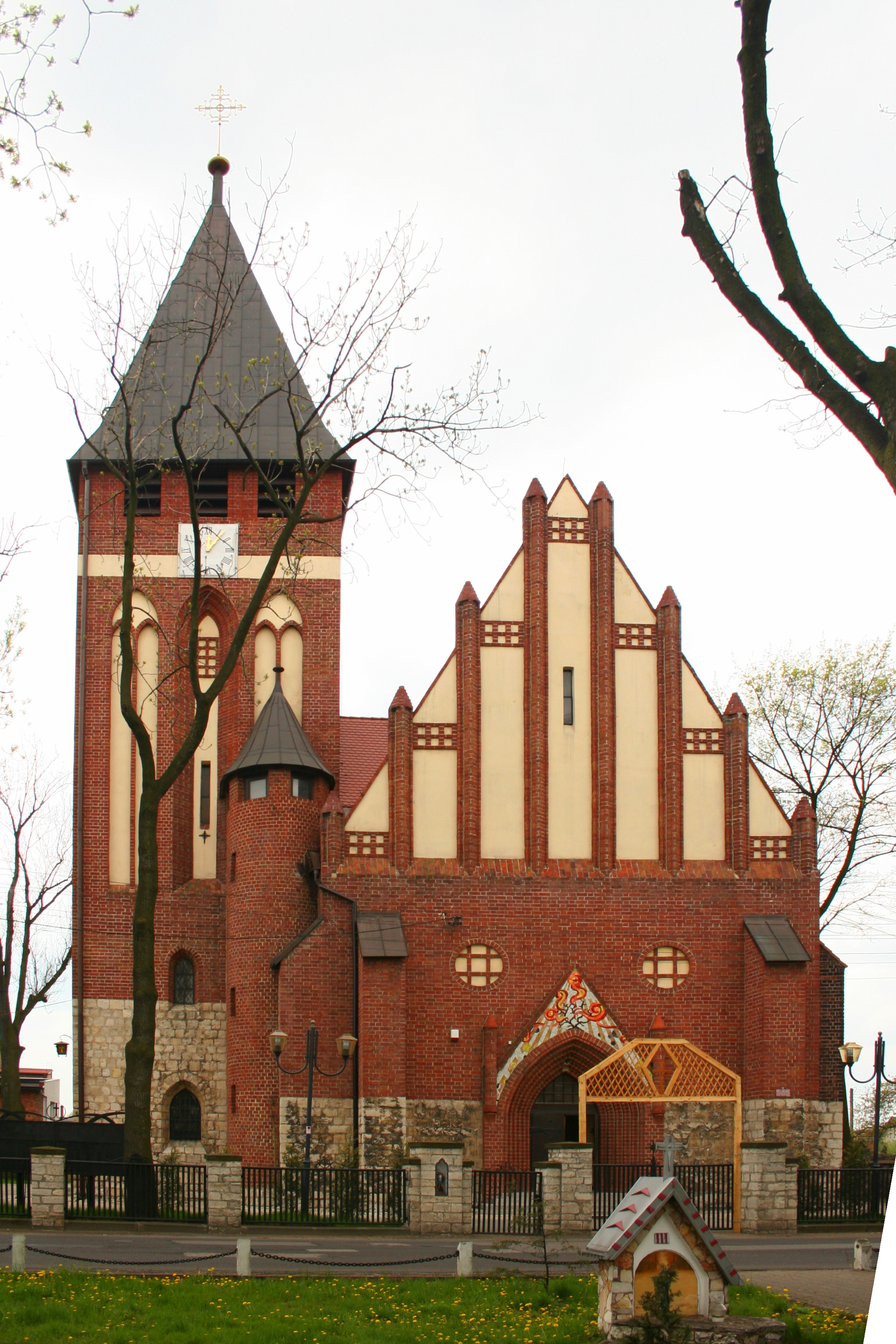 kościół Wniebowzięcia NMP (murowany) w Miasteczku Śląskim, Polska, województwo śląskie, powiat tarnogórski